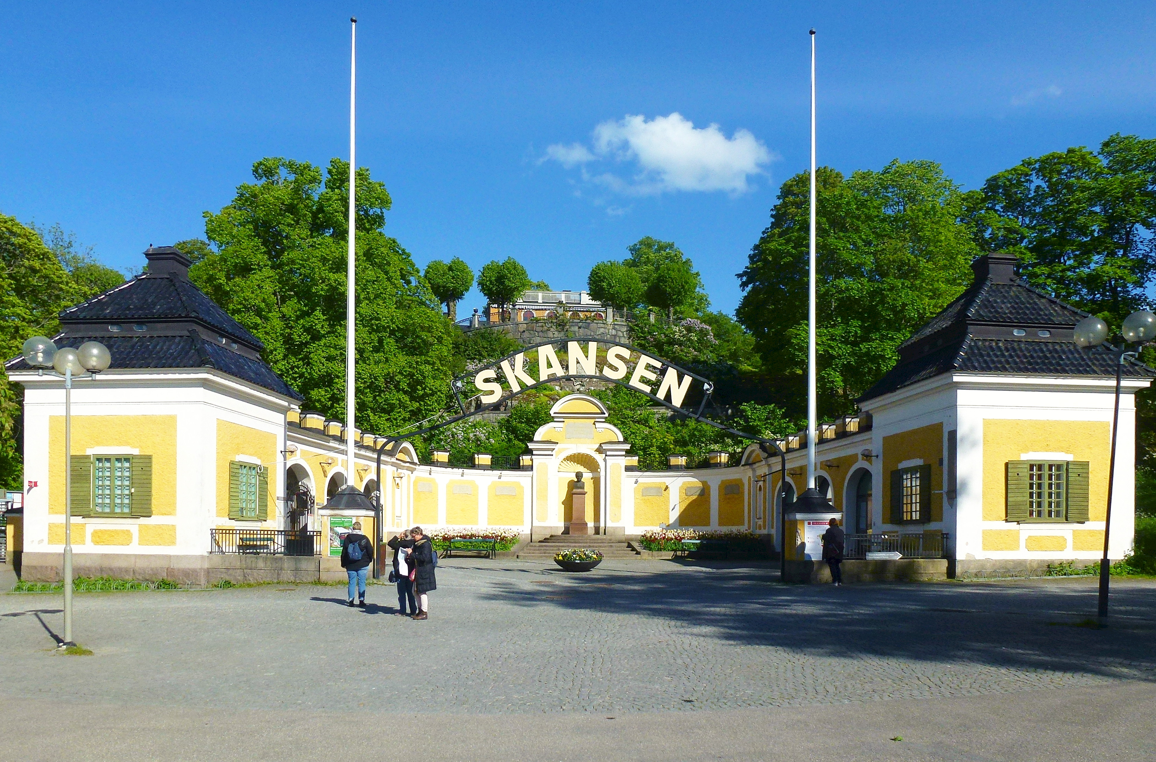 Skansens gamla entré